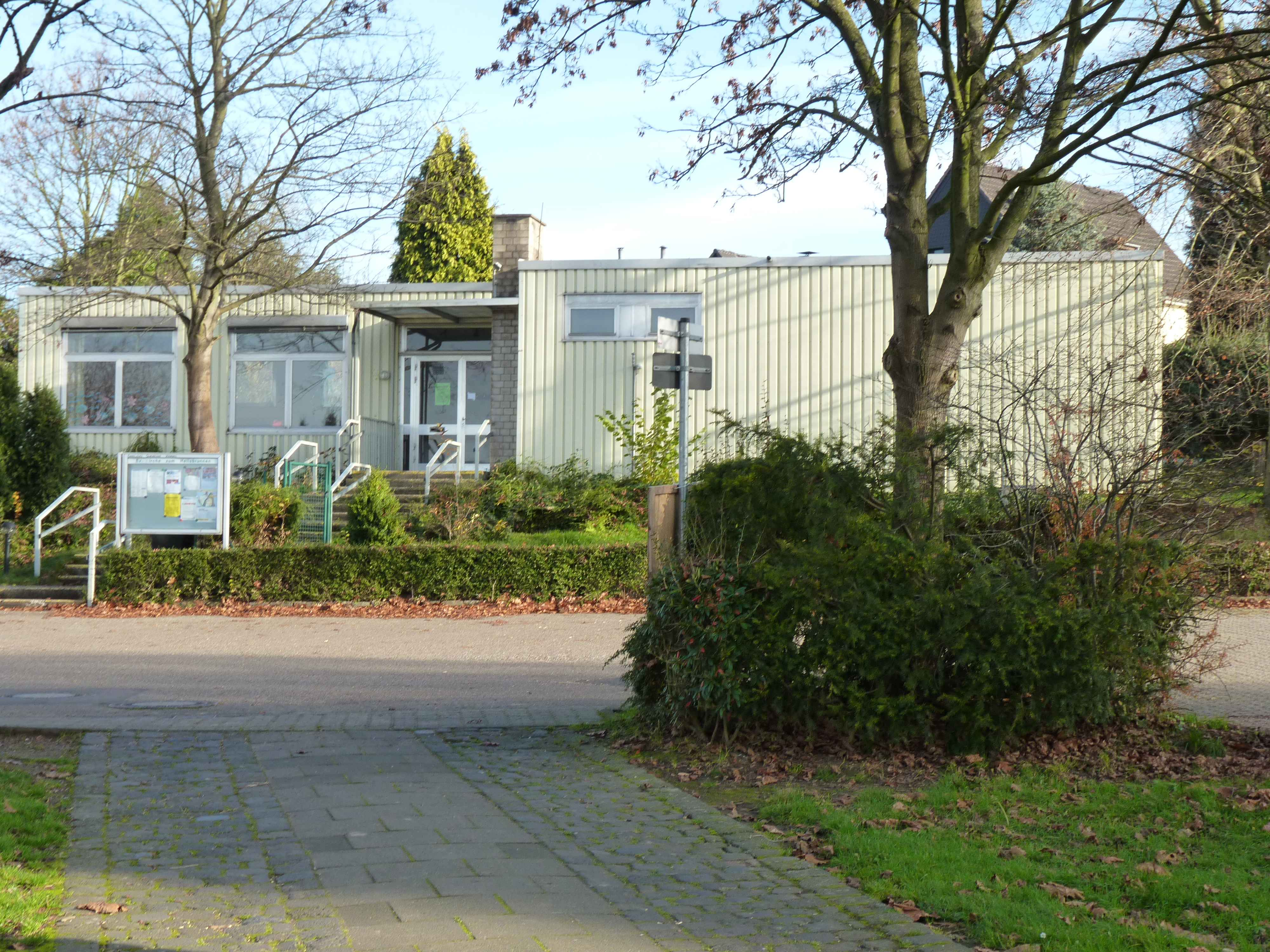 Pavillion der Evangelischen Kirche Zum Heilsbrunnen in Odenthal-Voiswinkel